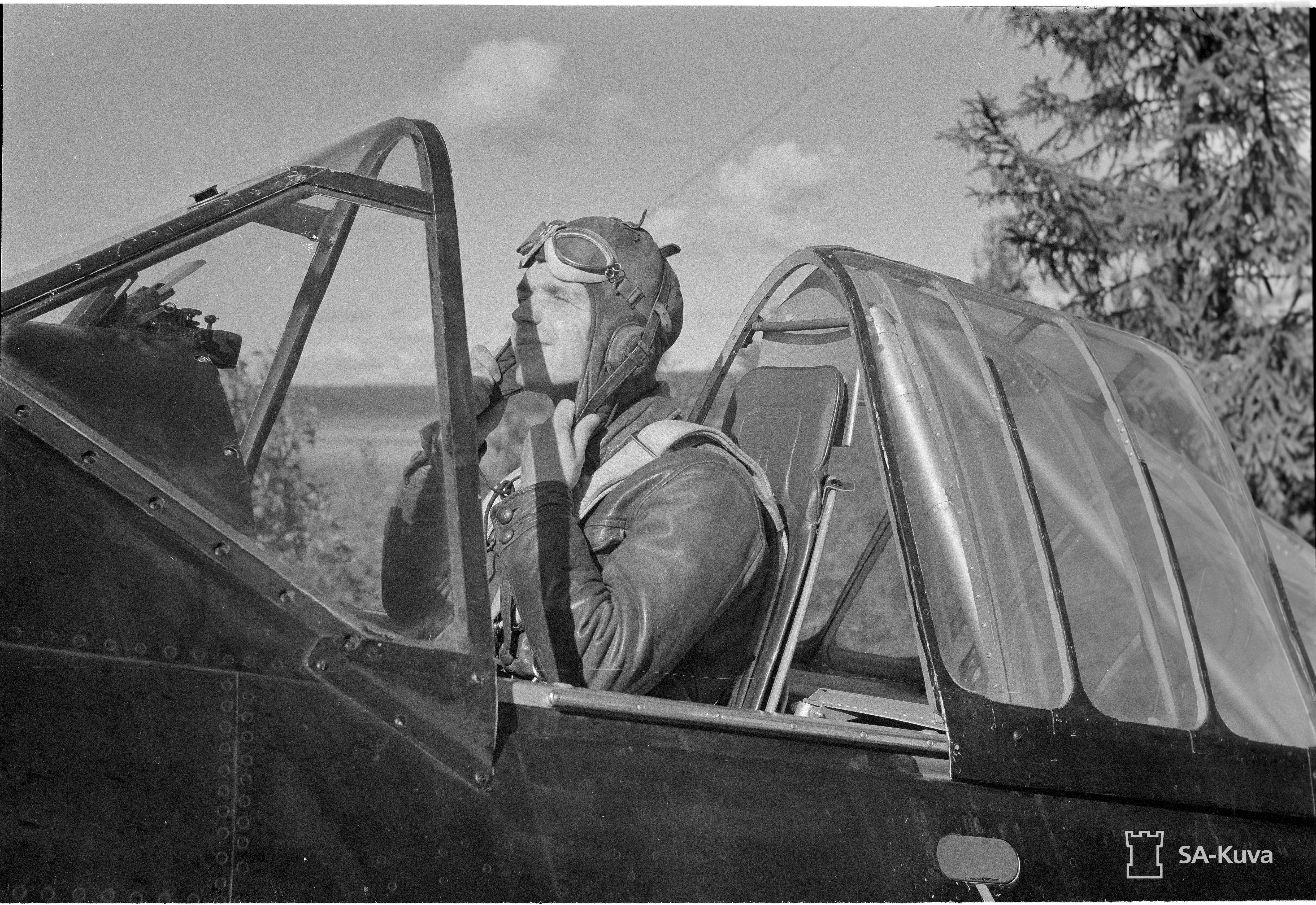 Mannerheim-ristin ritari Lauri Nissinen 3./LeLv 24:n Brewster Immolassa syyskuussa 1941.